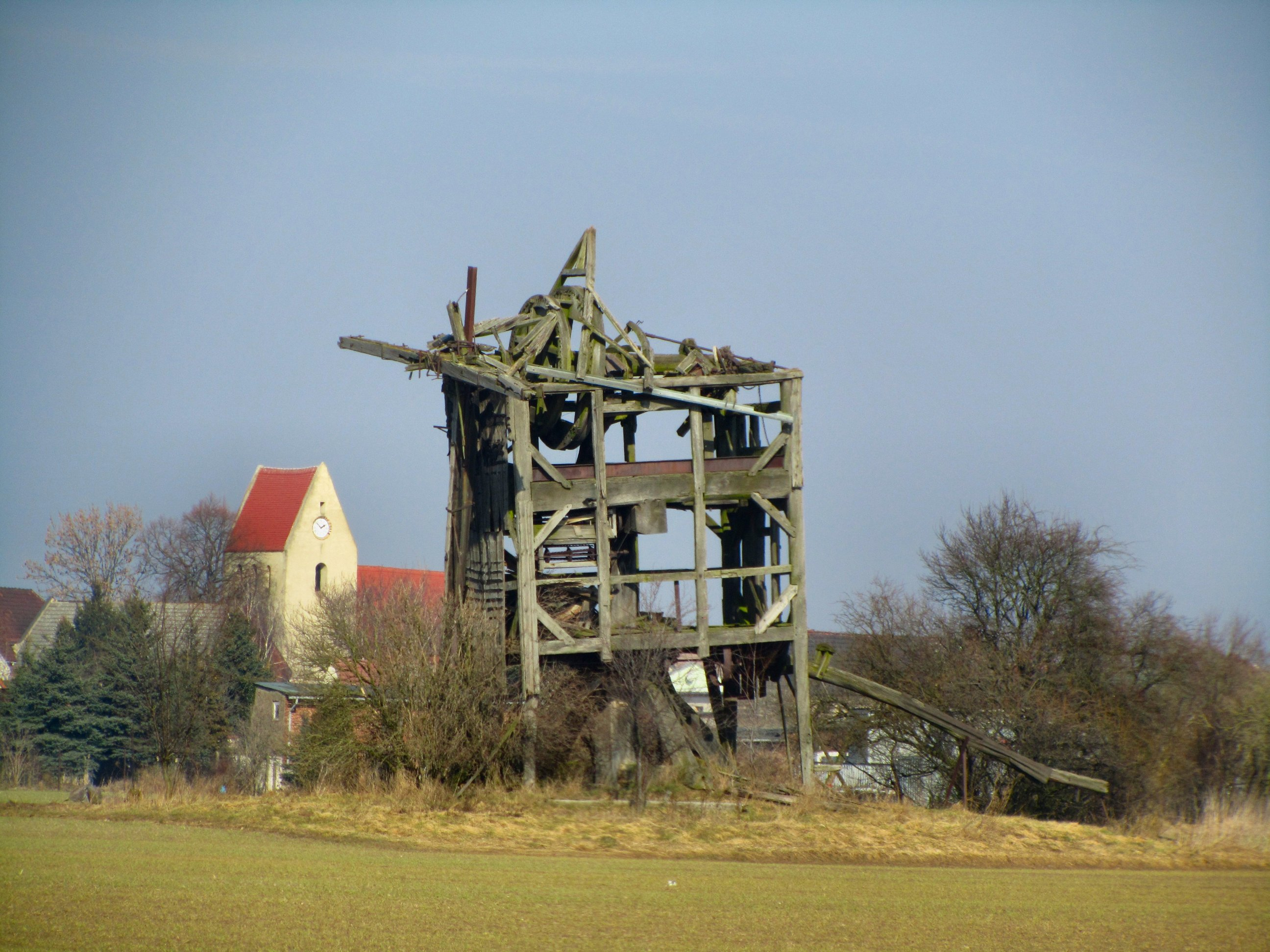 Tornitz, Windmühle, 2012 zusammengebrochen (Quelle